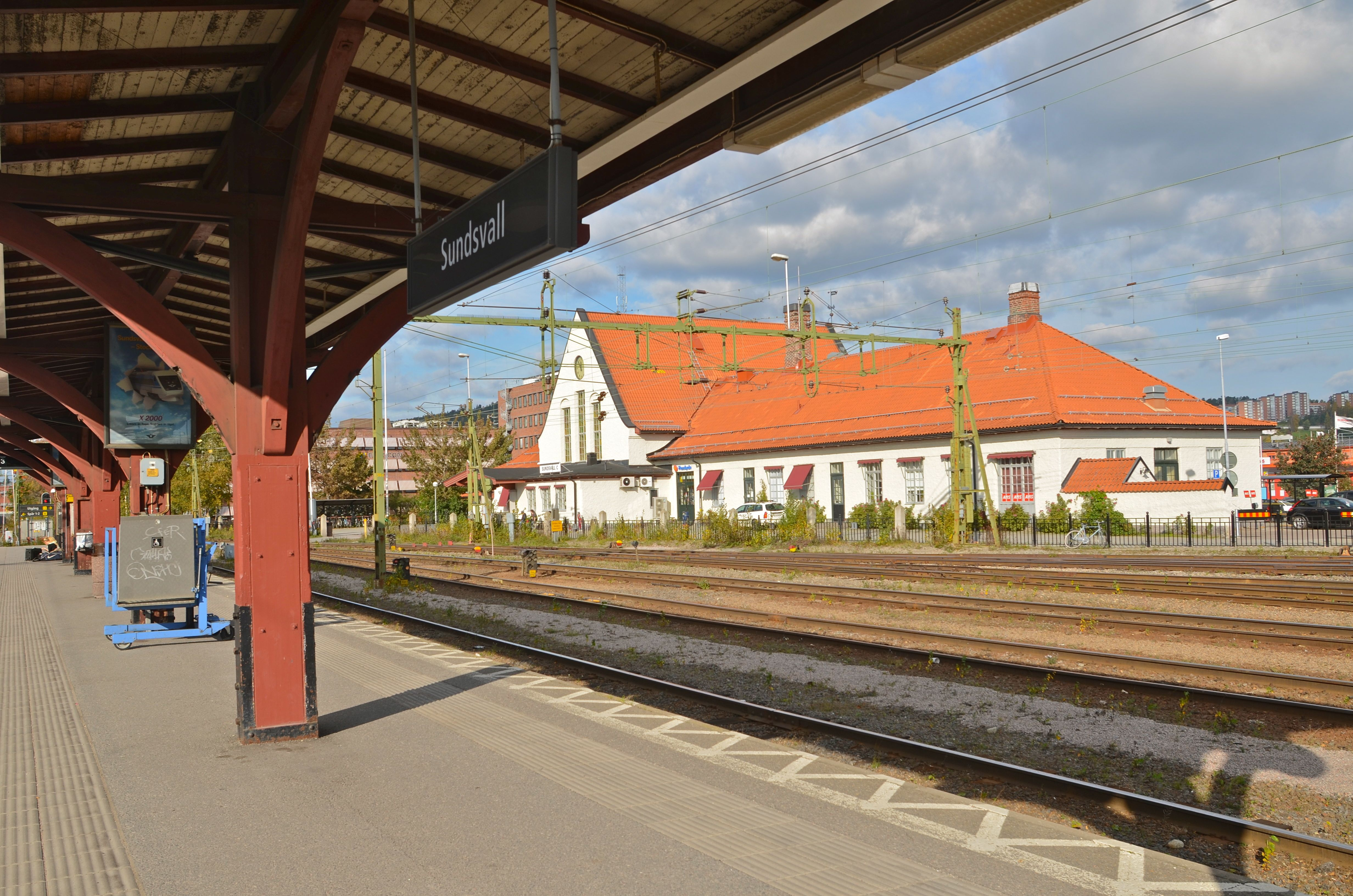 Sundsvalls centralstation med perrongtak, Östermalm 1:1 o 3:1-3:2